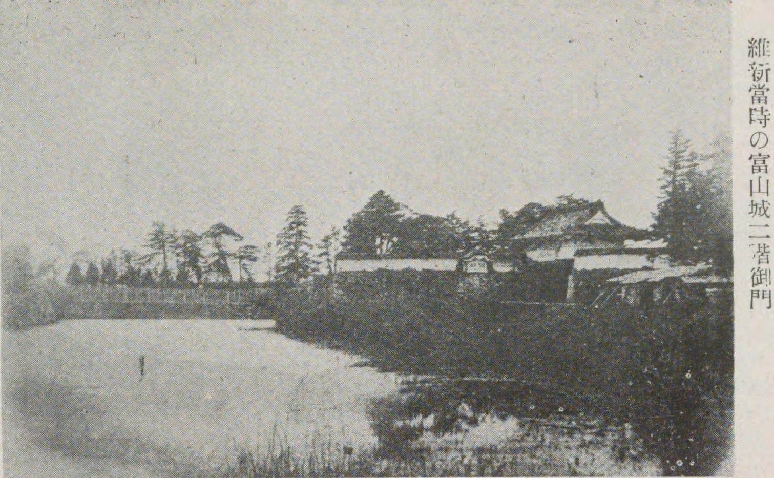 明治維新当時の富山城。まだ二の丸二階櫓御門が健在である。